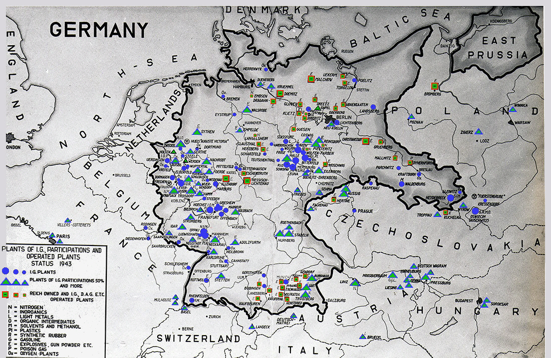 Werke und Betriebe der IG Farben 1943 (vor dem Ende des Dritten Reich)